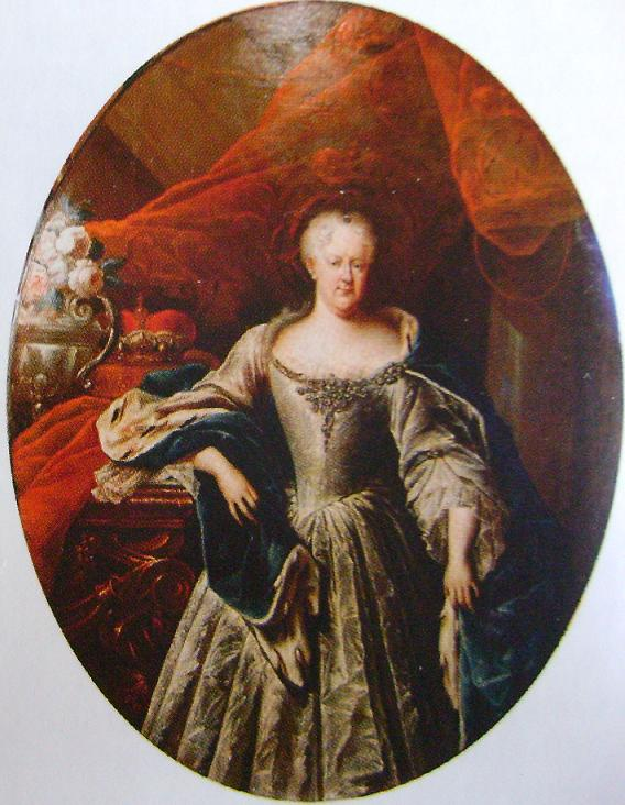 Christine Luise von Öttingen (1671-1747), Herzogin von Braunschweig-Wolfenbüttel